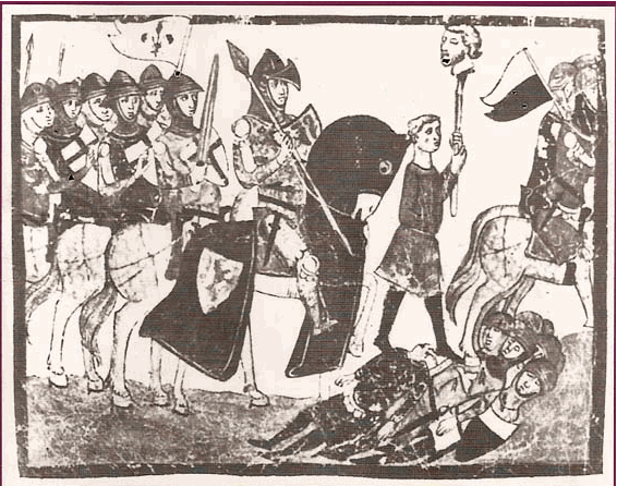 Bitva u Colle - 1269